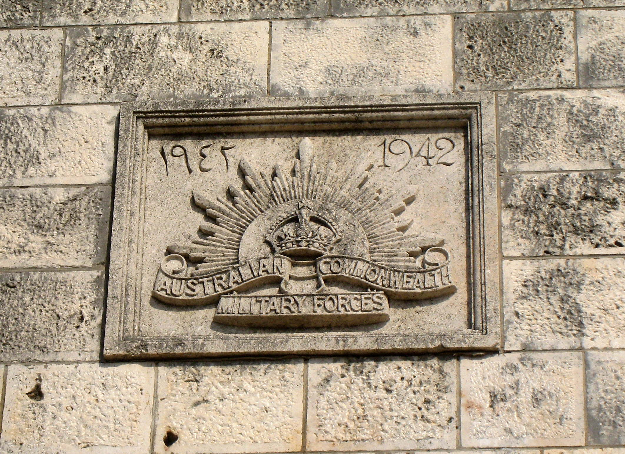 Plaque australienne de 1942